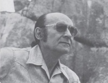 Fundador del Museo Científico Javier Cabrera